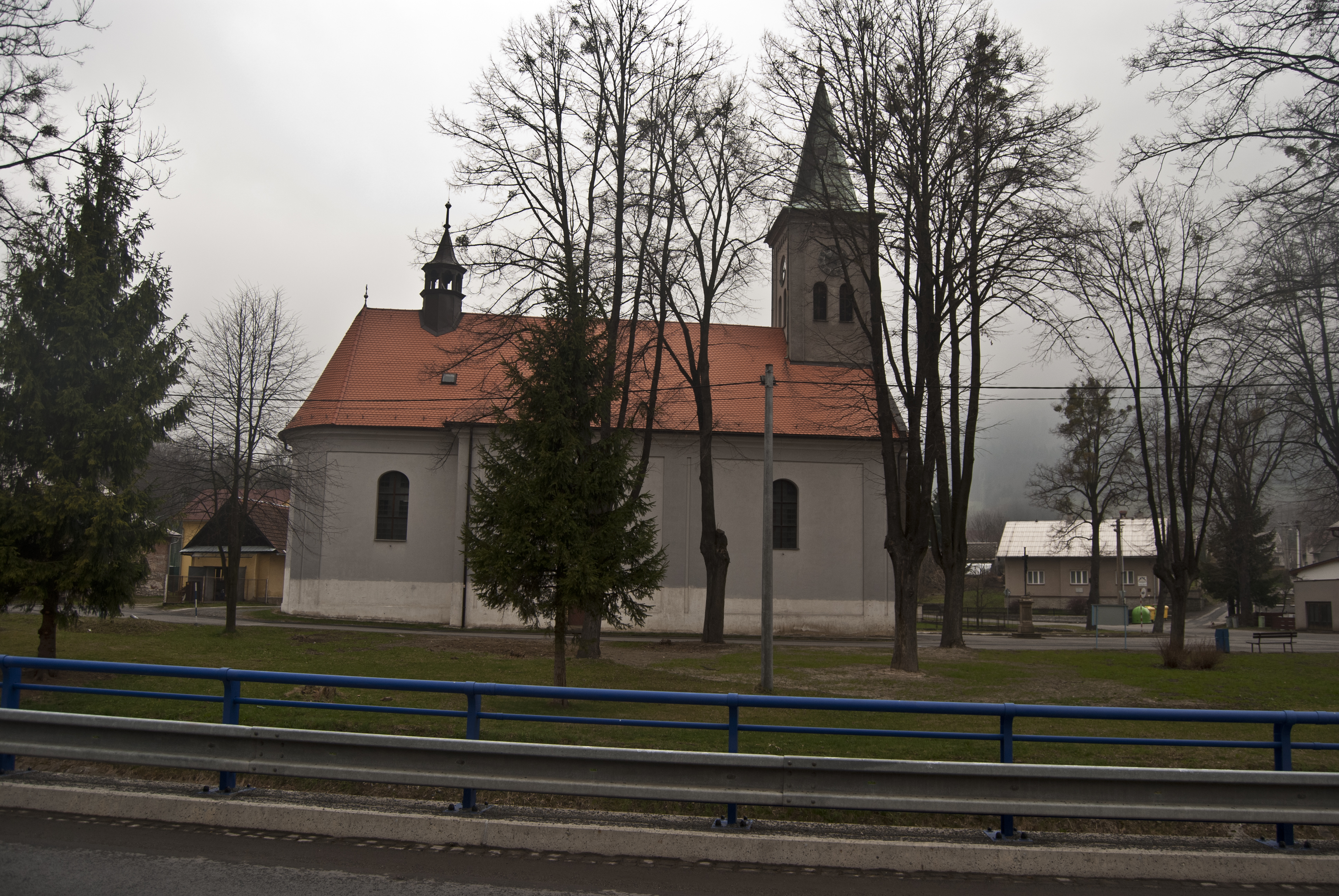 Kostel sv. Petra a Pavla (Lichnov), střed obce, Lichnov